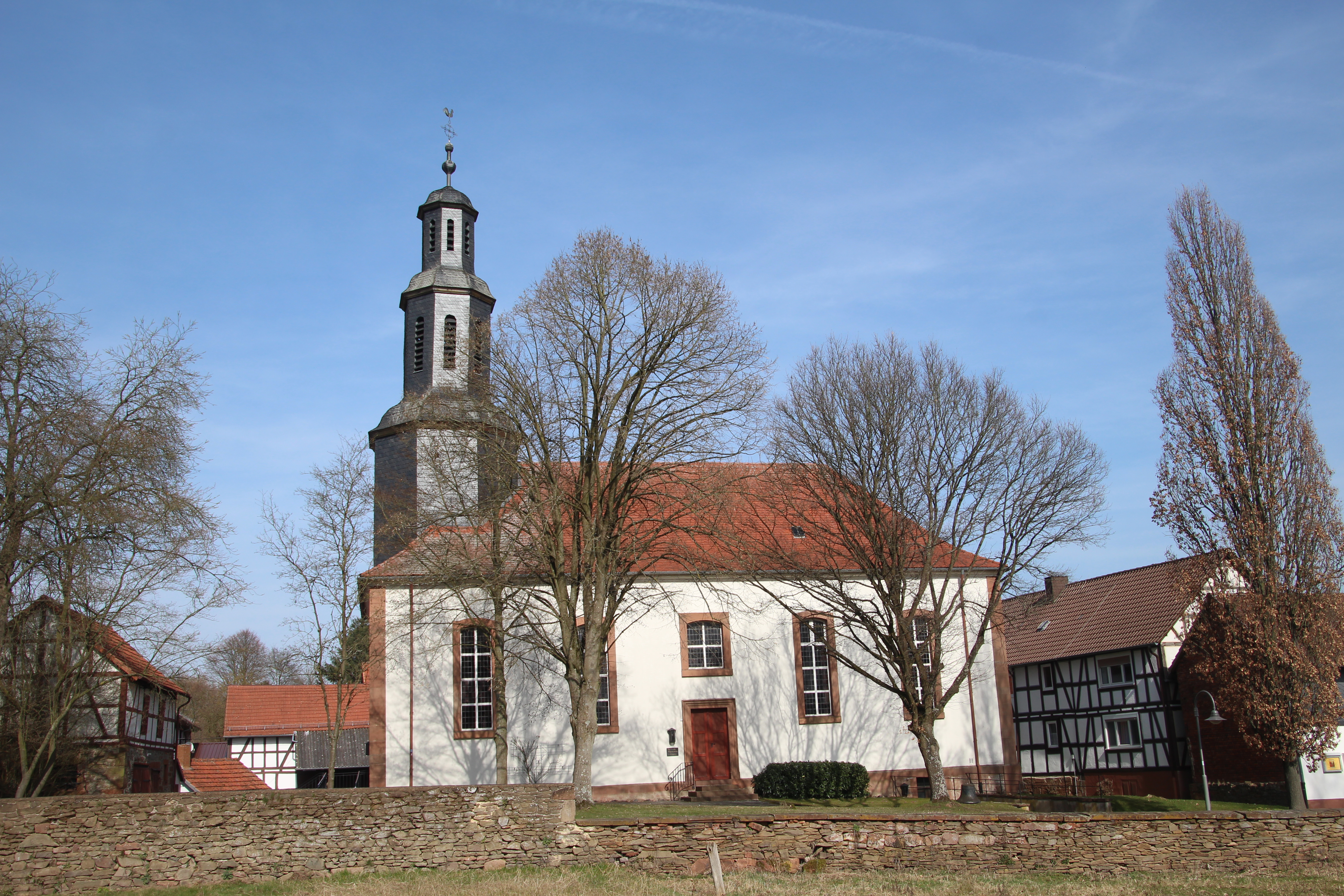 Siehe Bild und Dateiname